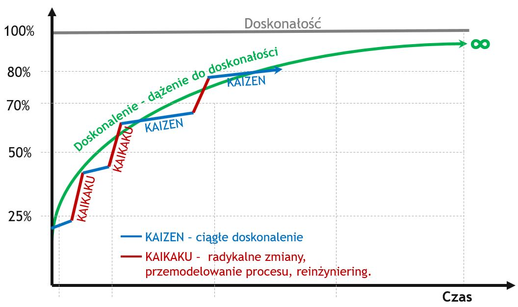 Wykres przedstawiający koncepcje powiązania dwóch zasad doskonalenia Kaizen i Kaikaku.